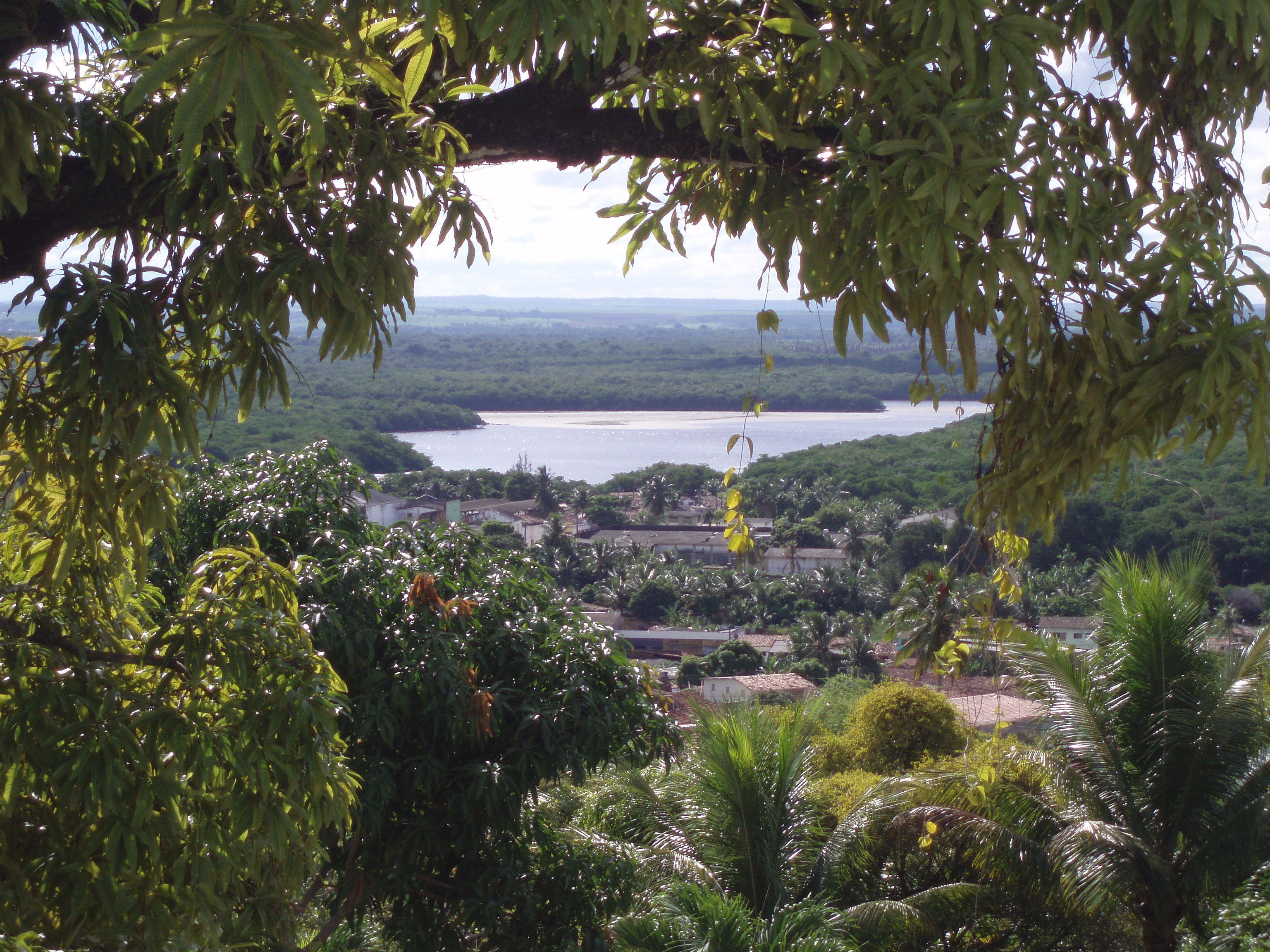 Brasil, João Pessoa, vista sobre o rio Sanhauá desde o convento São Francisco